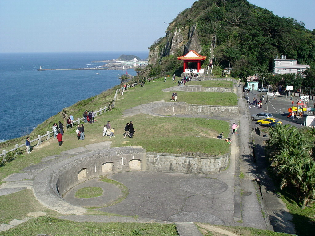 臺灣基隆市白米甕砲臺。